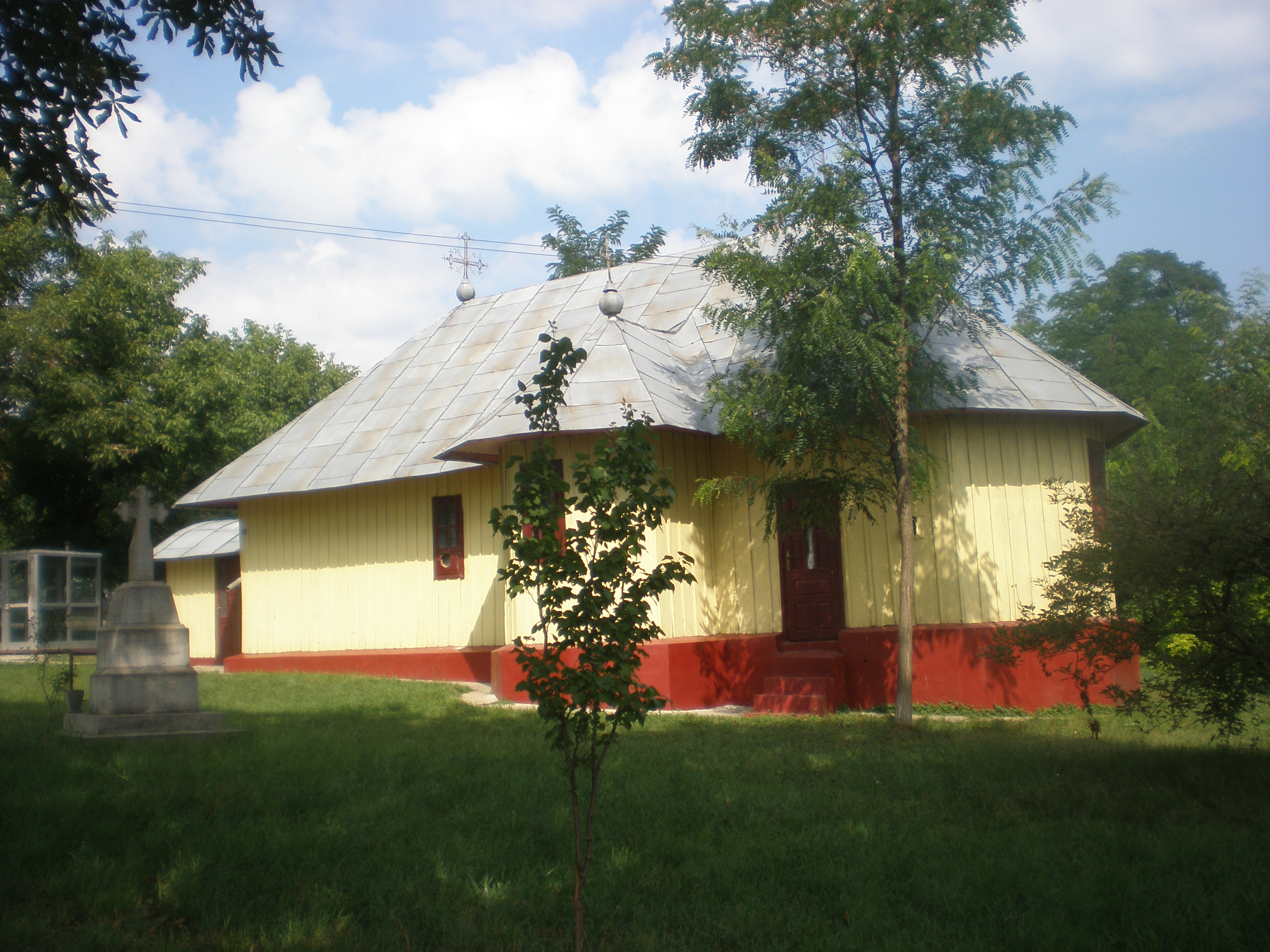 Biserica de lemn din localitatea "Aurel Vlaicu", Botoşani